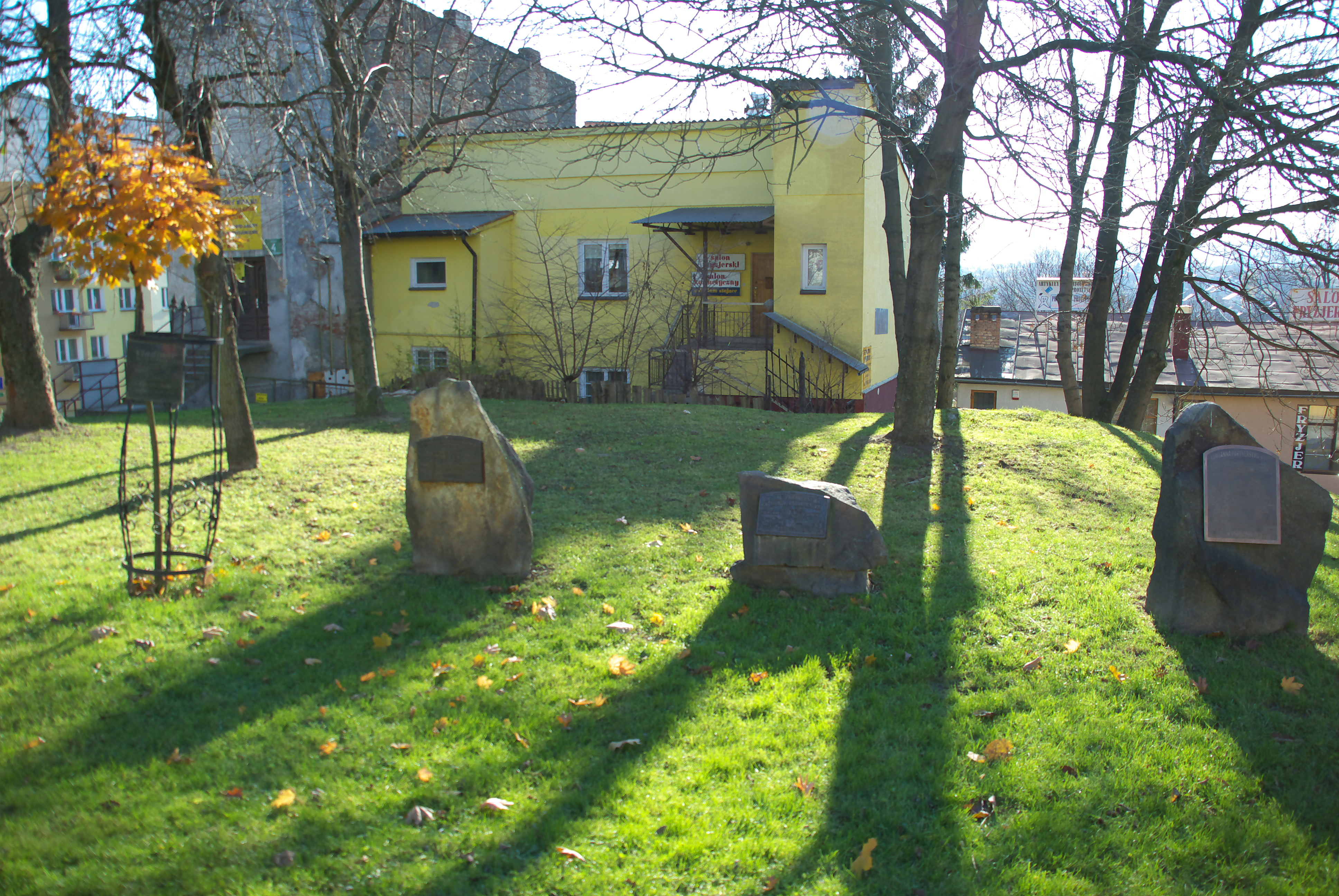 Tabliczki pamiątkowe na Placu Wolności w Sanoku